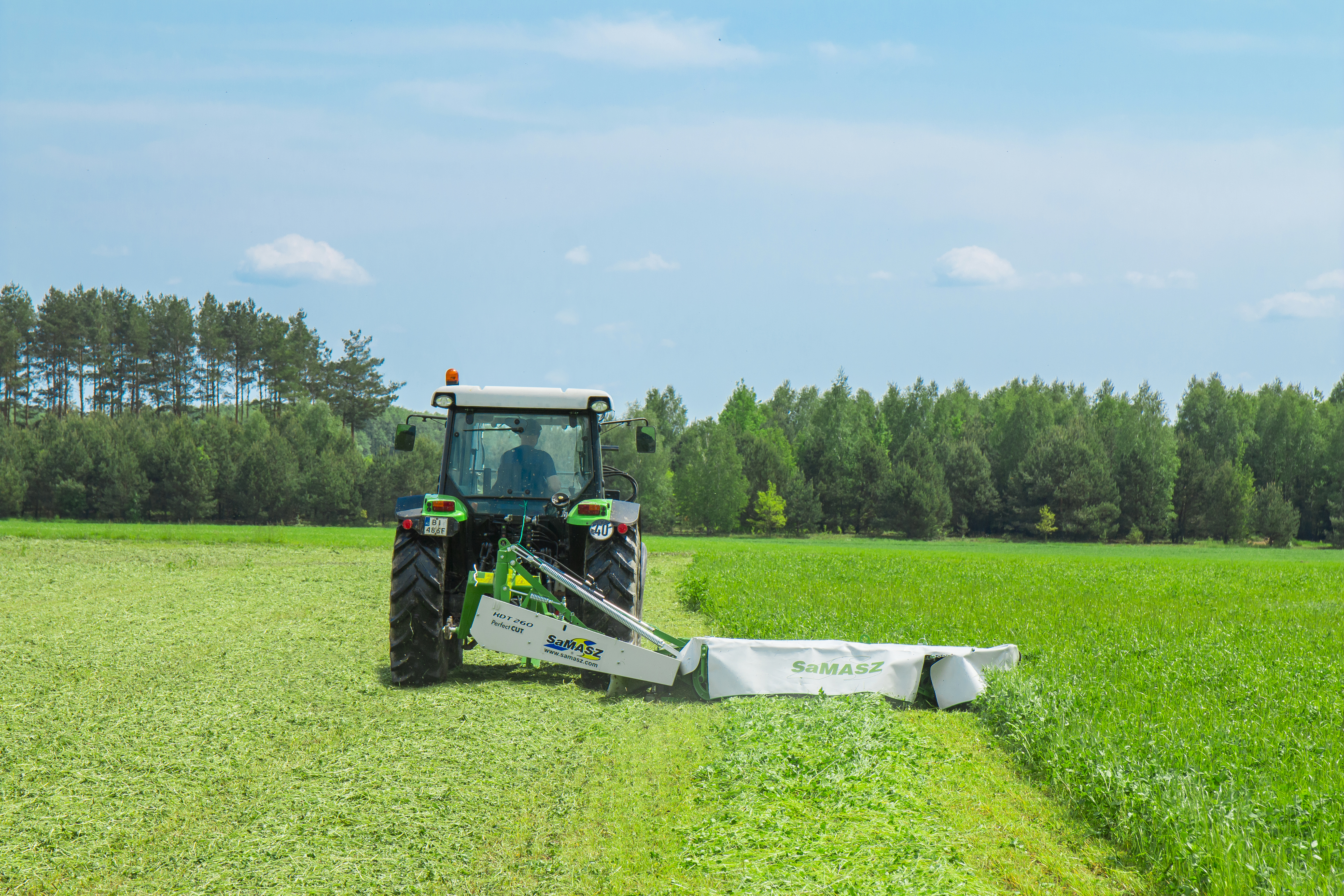 Kosiarka dyskowa boczna serii KDT o szerokości roboczej 2,6 m